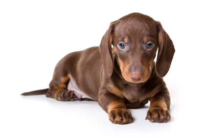 A Dachshund puppy